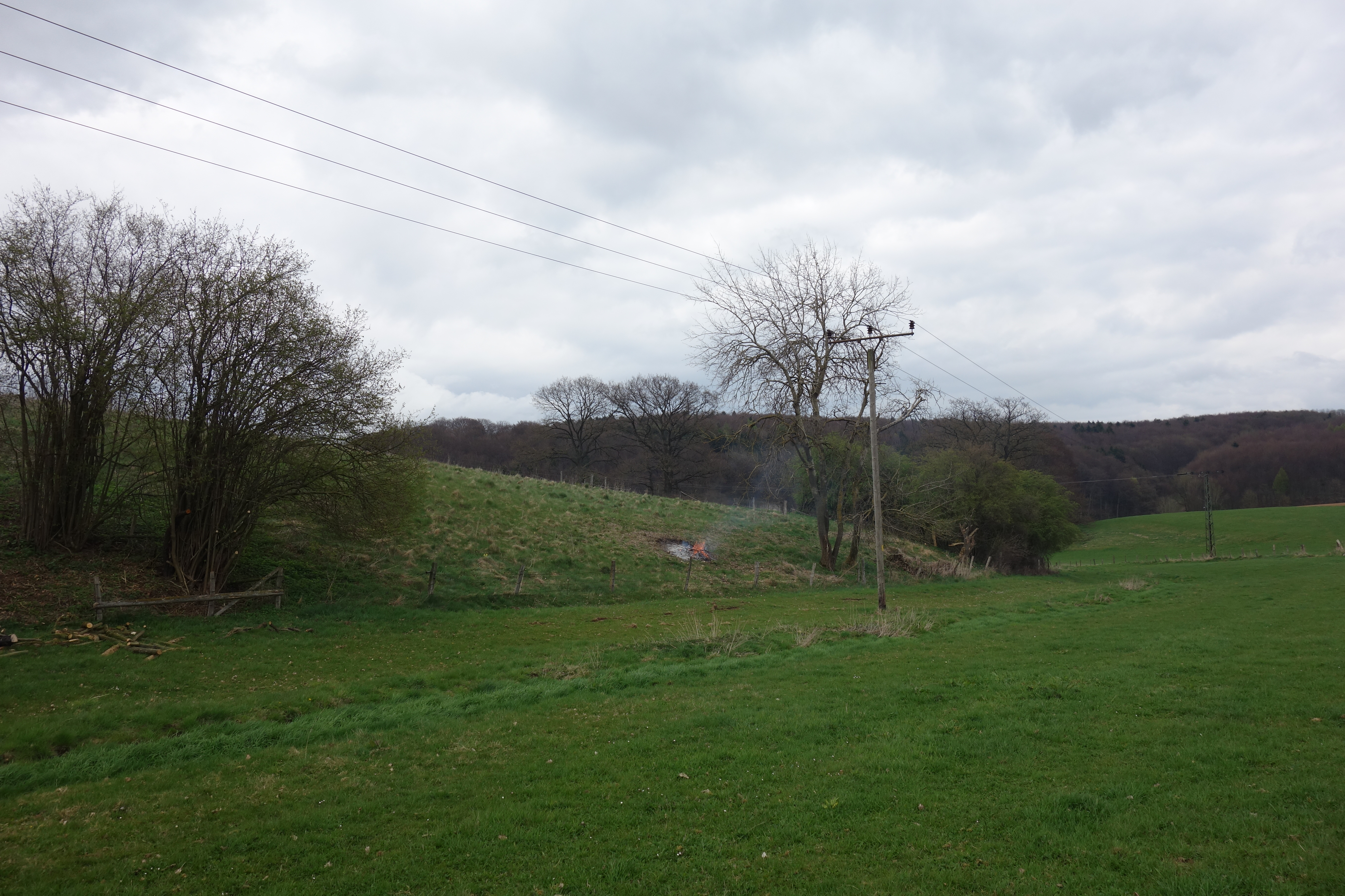 Magerrasen am Hang östlich des Kalkofen im Bereich Schlage im Naturschutzgebiet Glindetal, nach Entbuschung durch Landschaftspflegetrupp der Biologischen Station Hochsauerlandkreis. Fläche im Eigentum des Verein für Natur und Vogelschutz.